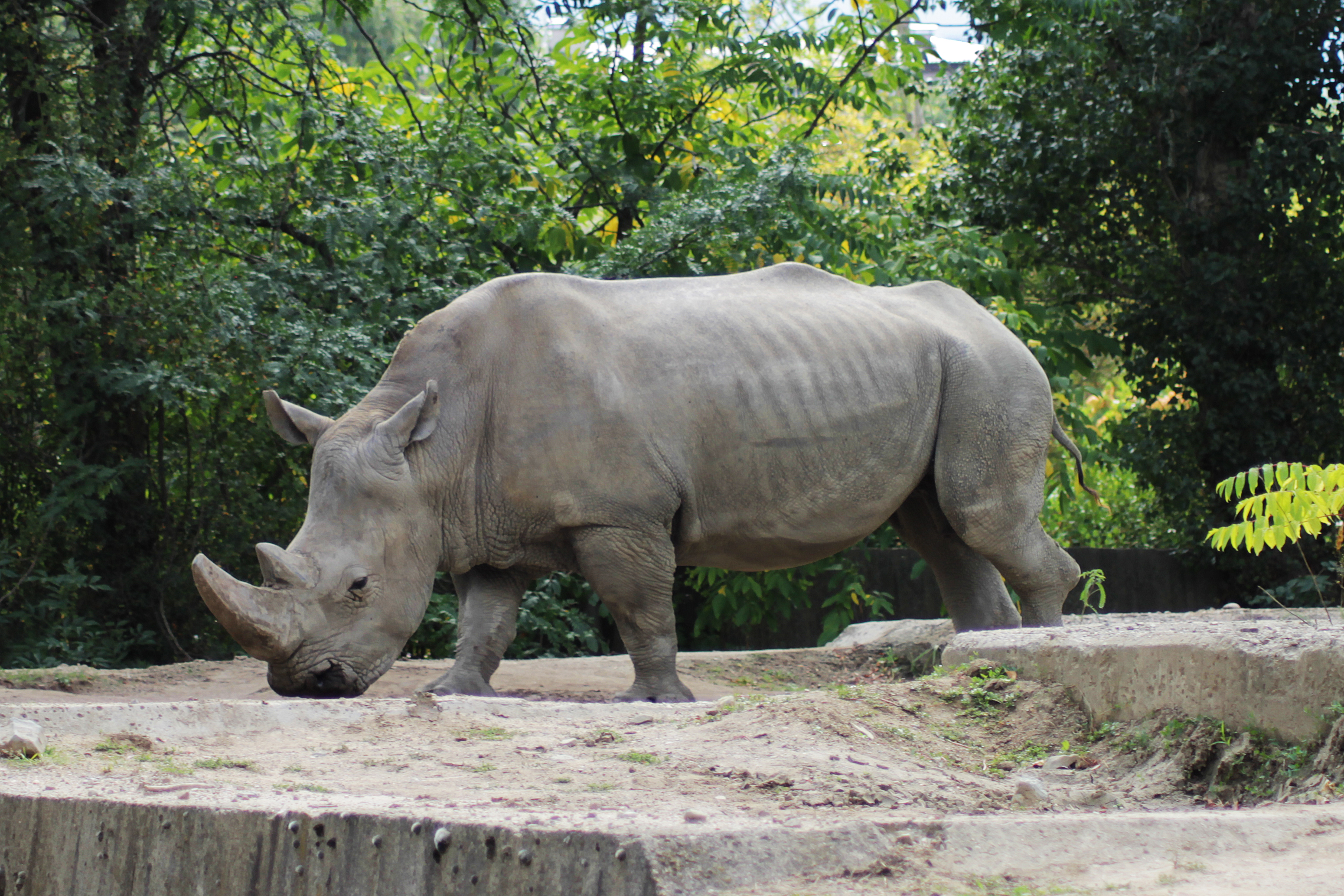 Носорог в Софийския зоопарк